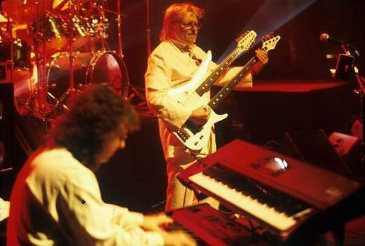 Le Orme in concerto, 2001